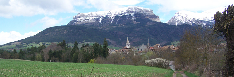 Panorama general de Mens en Trièves vue de l'ouest